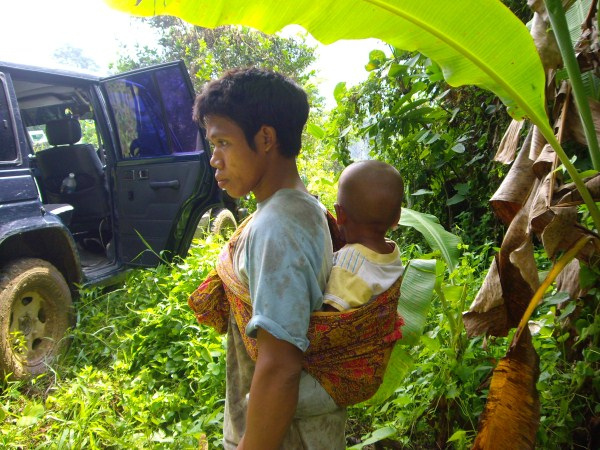 chewong